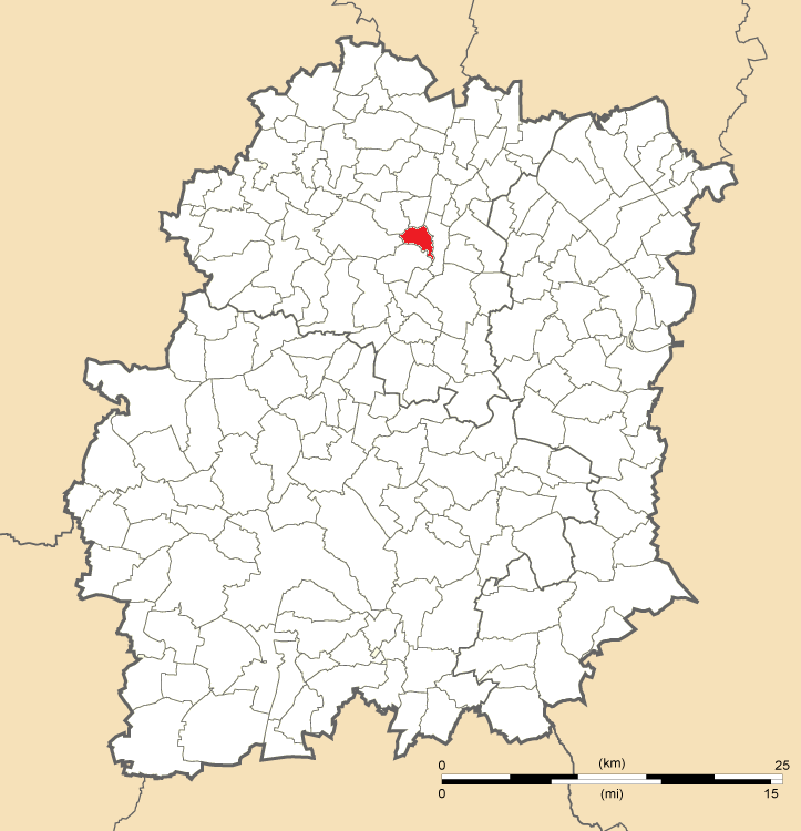 Carte de position de Montlhéry en Essonne.